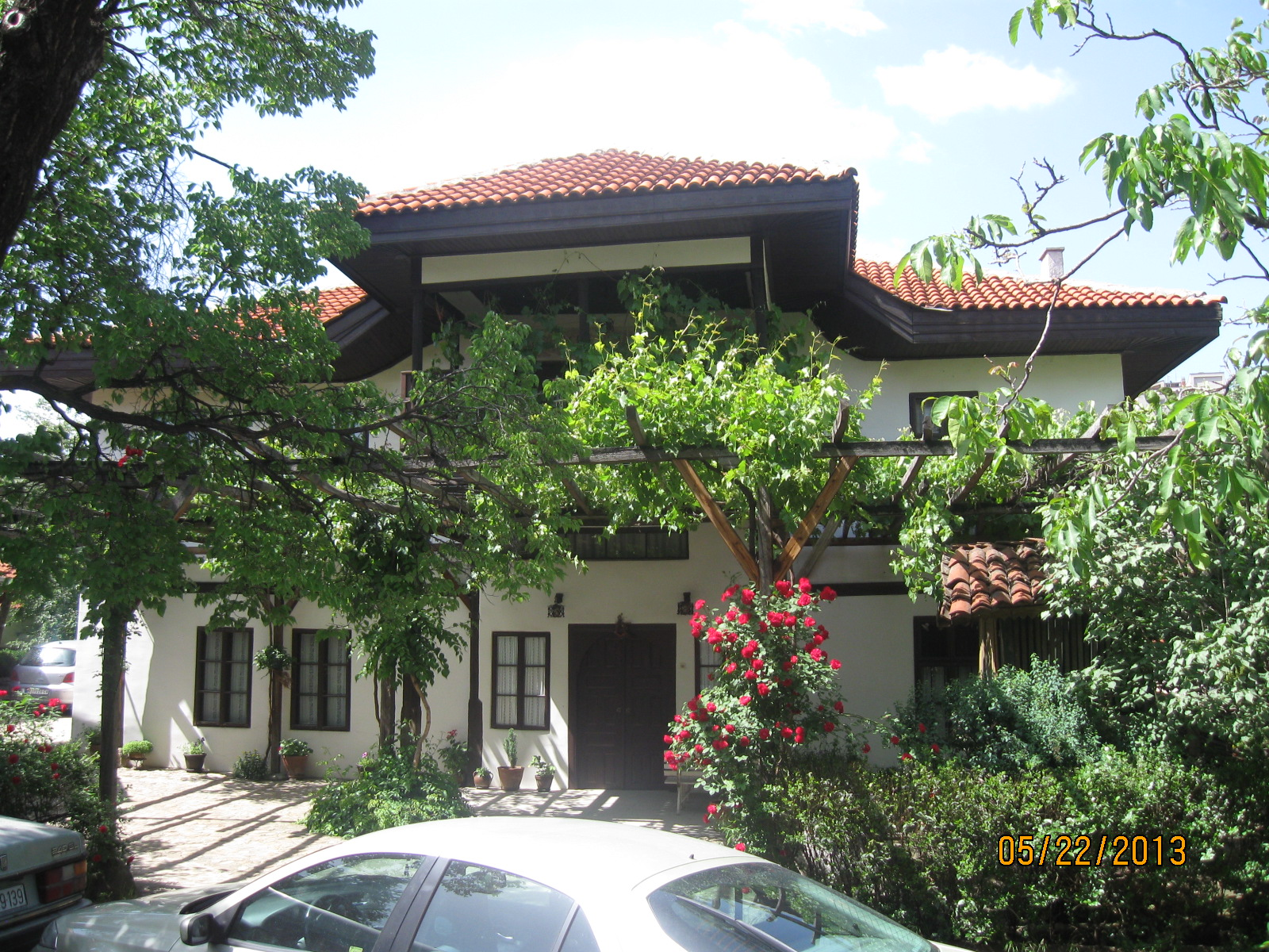 Кућа Драгутина Влајинца